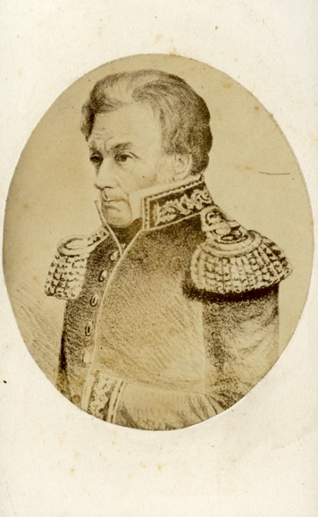 Reproducción fotográfica de un retrato pictórico de época del militar y político argentino que se desempeñó en varias oportunidades como gobernador de la Provincia de Buenos Aires.